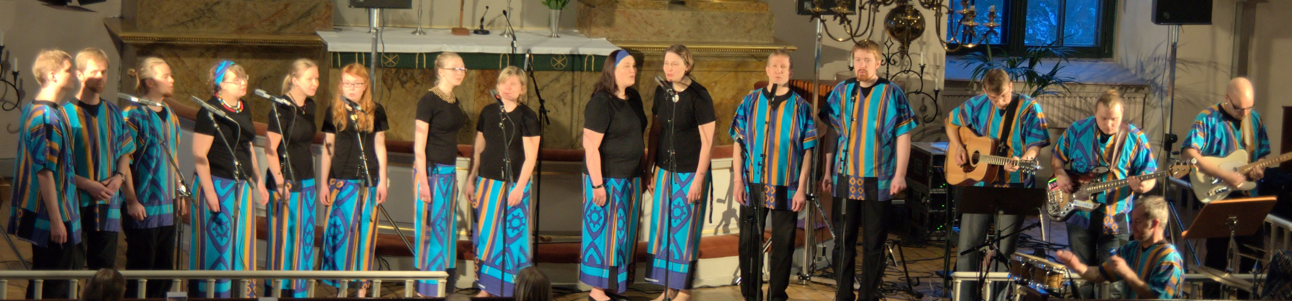 Suomalainen gospel yhtye Jakaranda